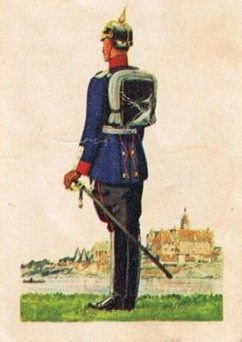 Pocztówka z 1910 r. przedstawiająca żołnierza Pułku piechoty im. Zakonu Niemieckiego w Malborku